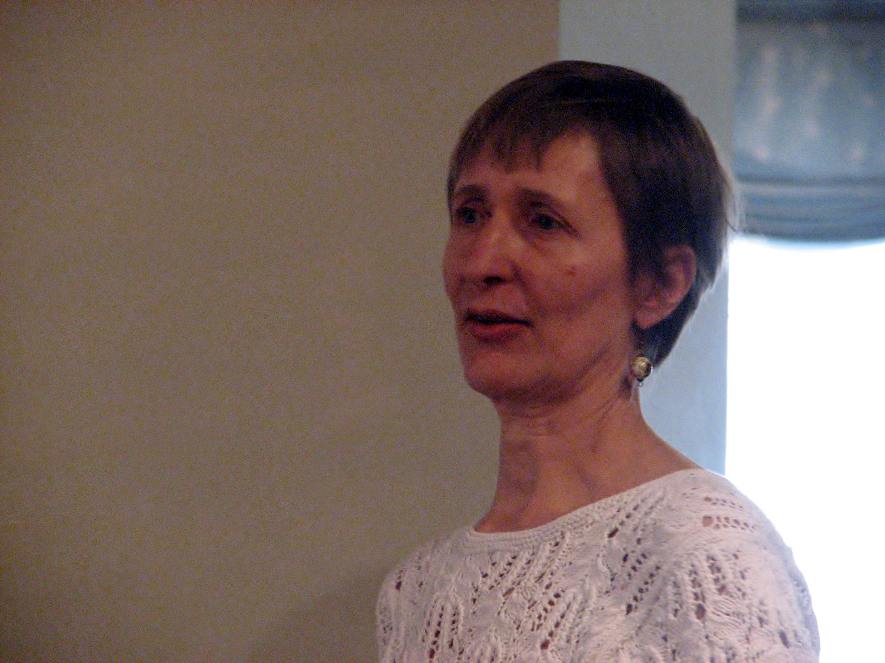 Ene Paaver Eesti Teatriliidus raamatuesitlusel